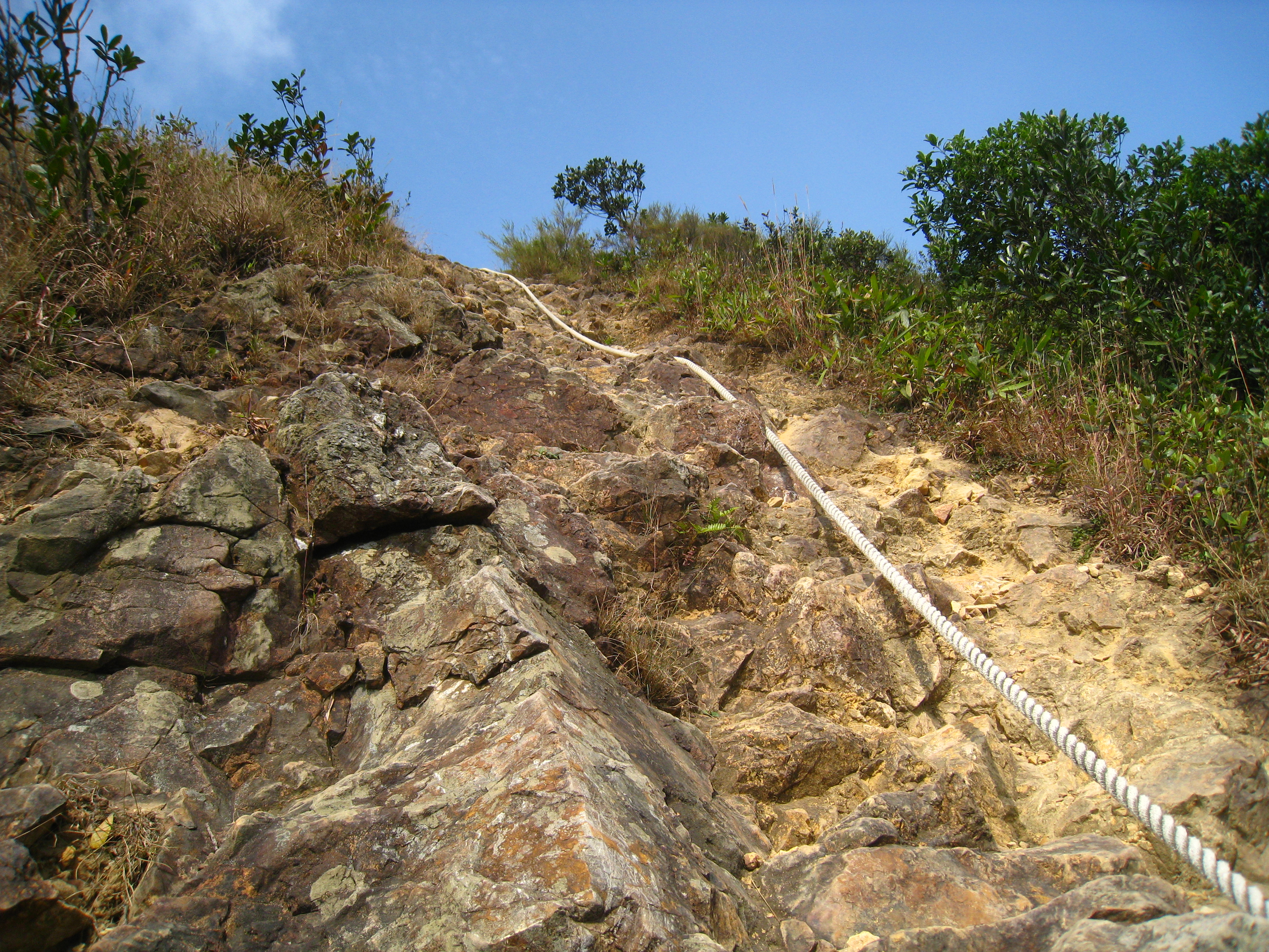 中文（香港）: 吊手岩，位於zh:馬鞍山zh:牛押山南面。